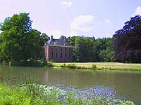 Ridderhostad Rhynauwen, foto: c.b.w.j. van noort categorie:afbeelding kasteel